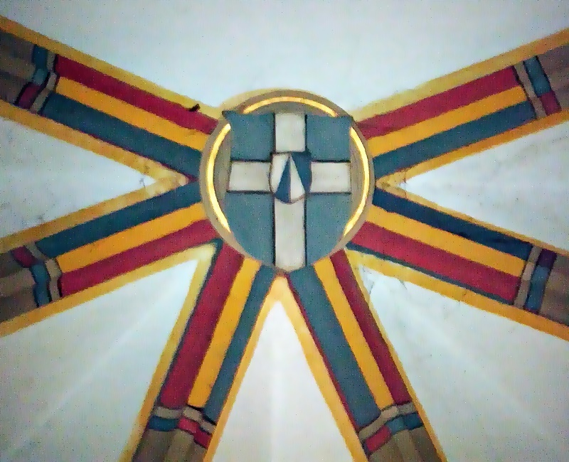 Wappenschlussstein des Speyerer Fürstbischofs Matthias von Rammung im Chor der Wallfahrtskirche Waghäusel.